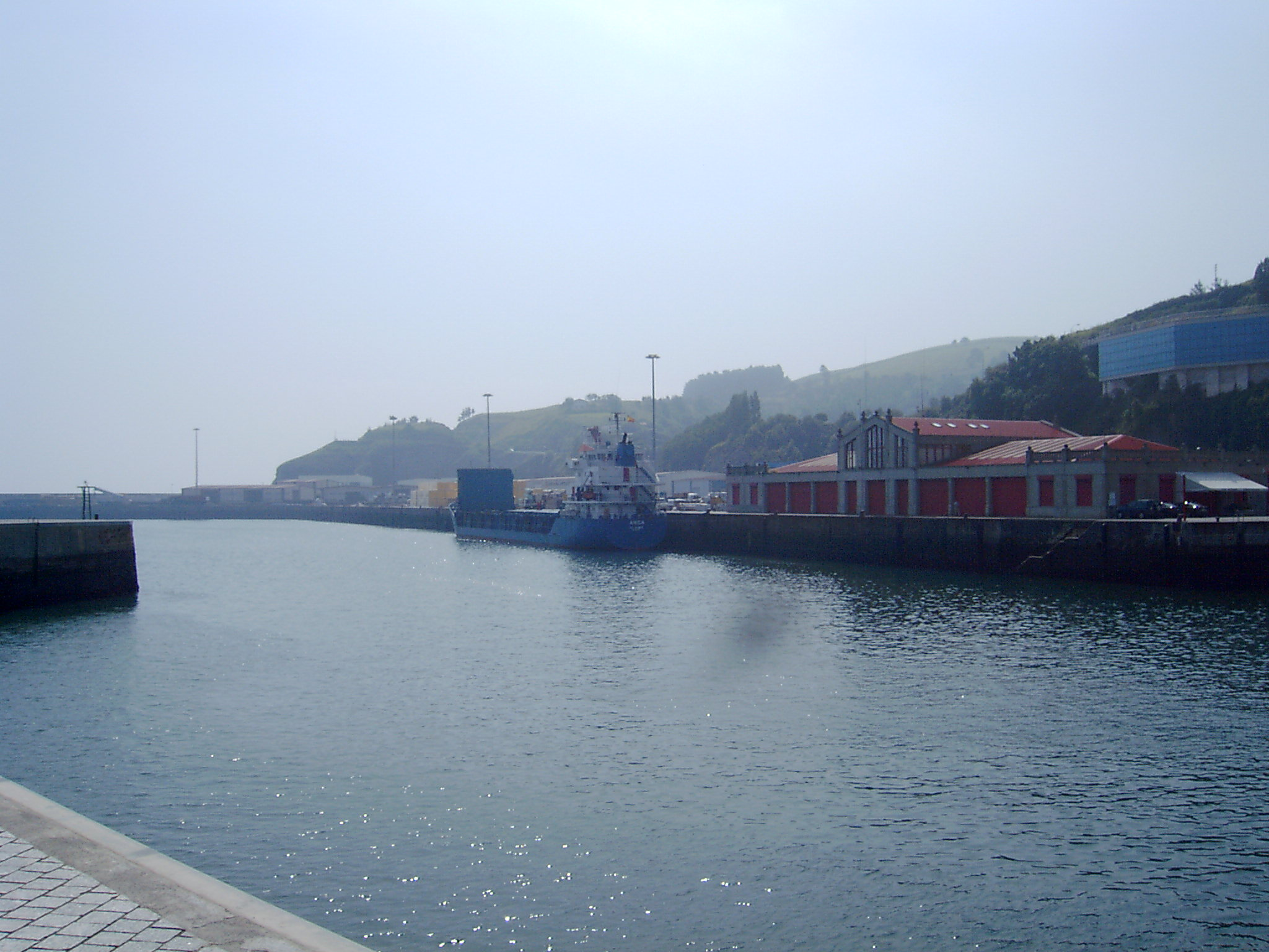 Commercial port